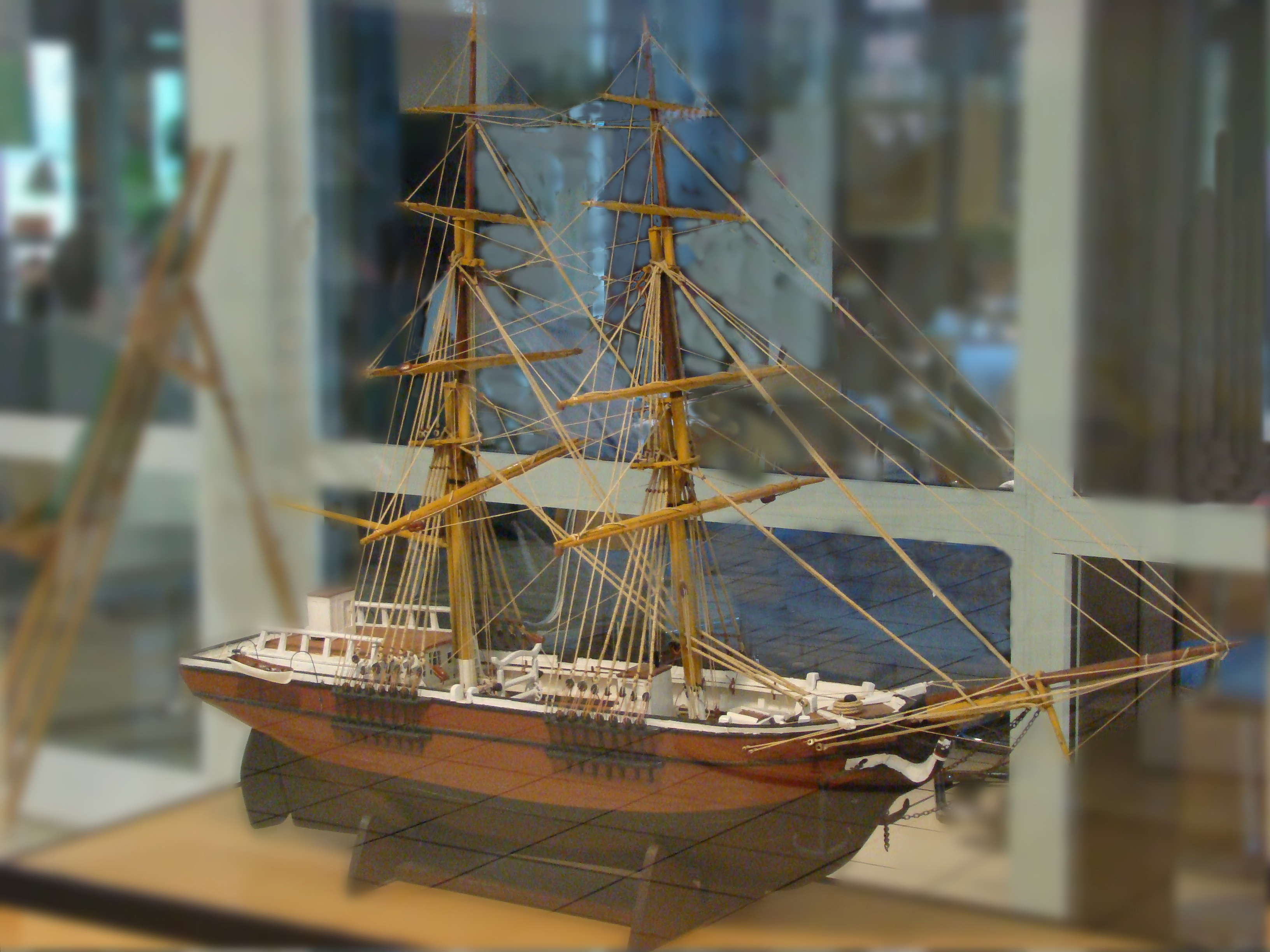 Modell des Missionsschiffes Kandaze im Ludwig Harms Haus, Hermannsburg